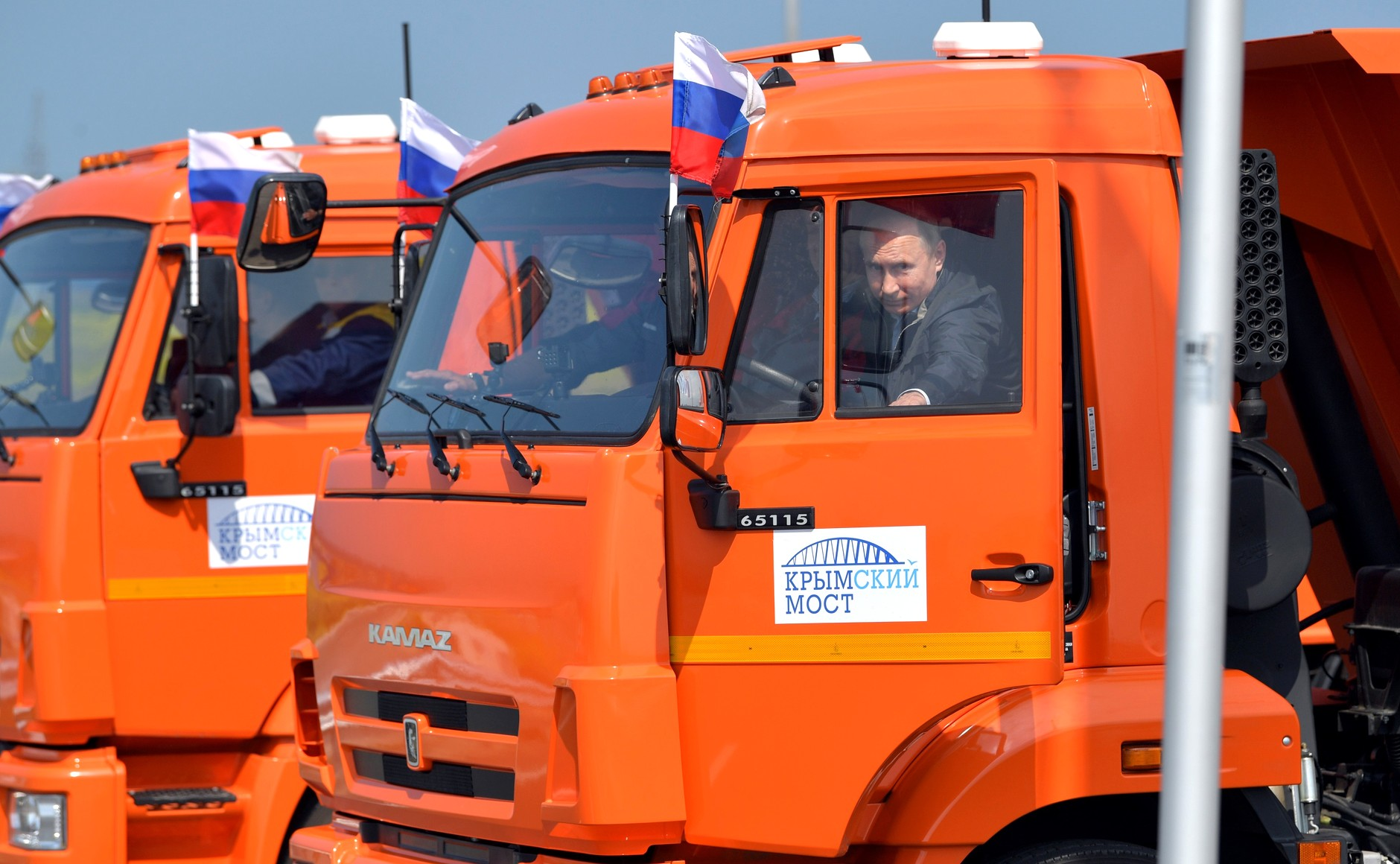 Открытие Крымского моста